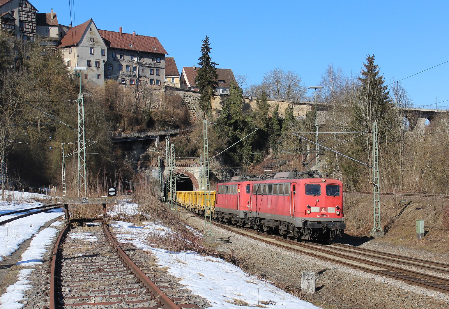 Die Baureihe 140 mit einem Aushubzug verlässt aus dem Tunnel neben älteste Rottweiler Stadt Baden-Württembergs